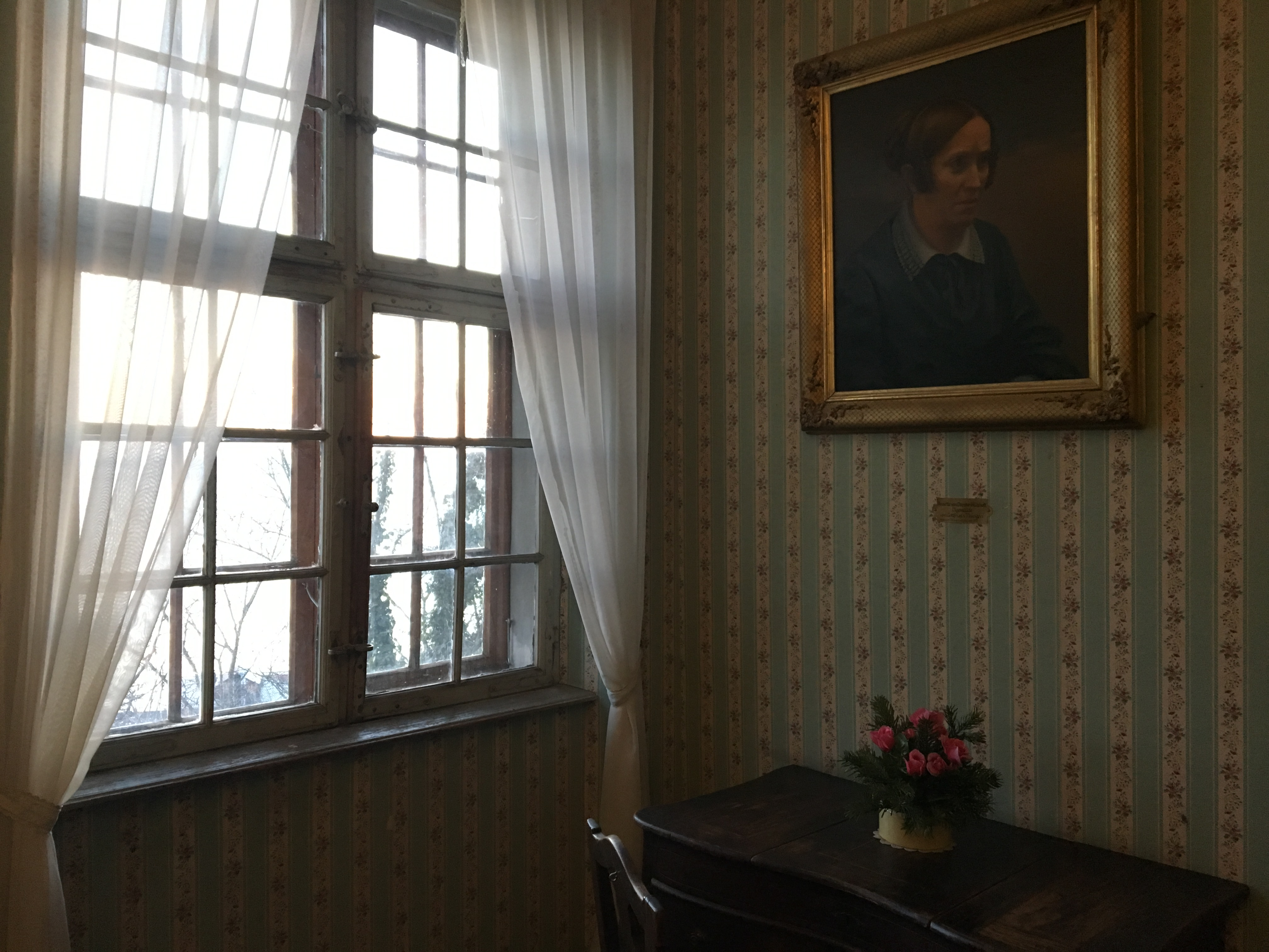 Vista do quarto em que a poeta alemã Annette von Droste-Hülshoff viveu a maior parte de sua vida.